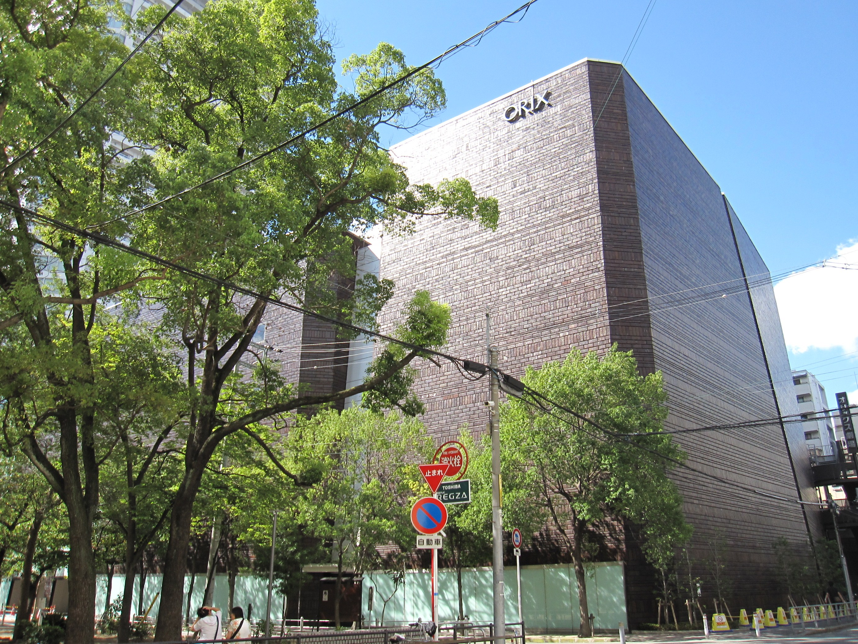 オリックス劇場